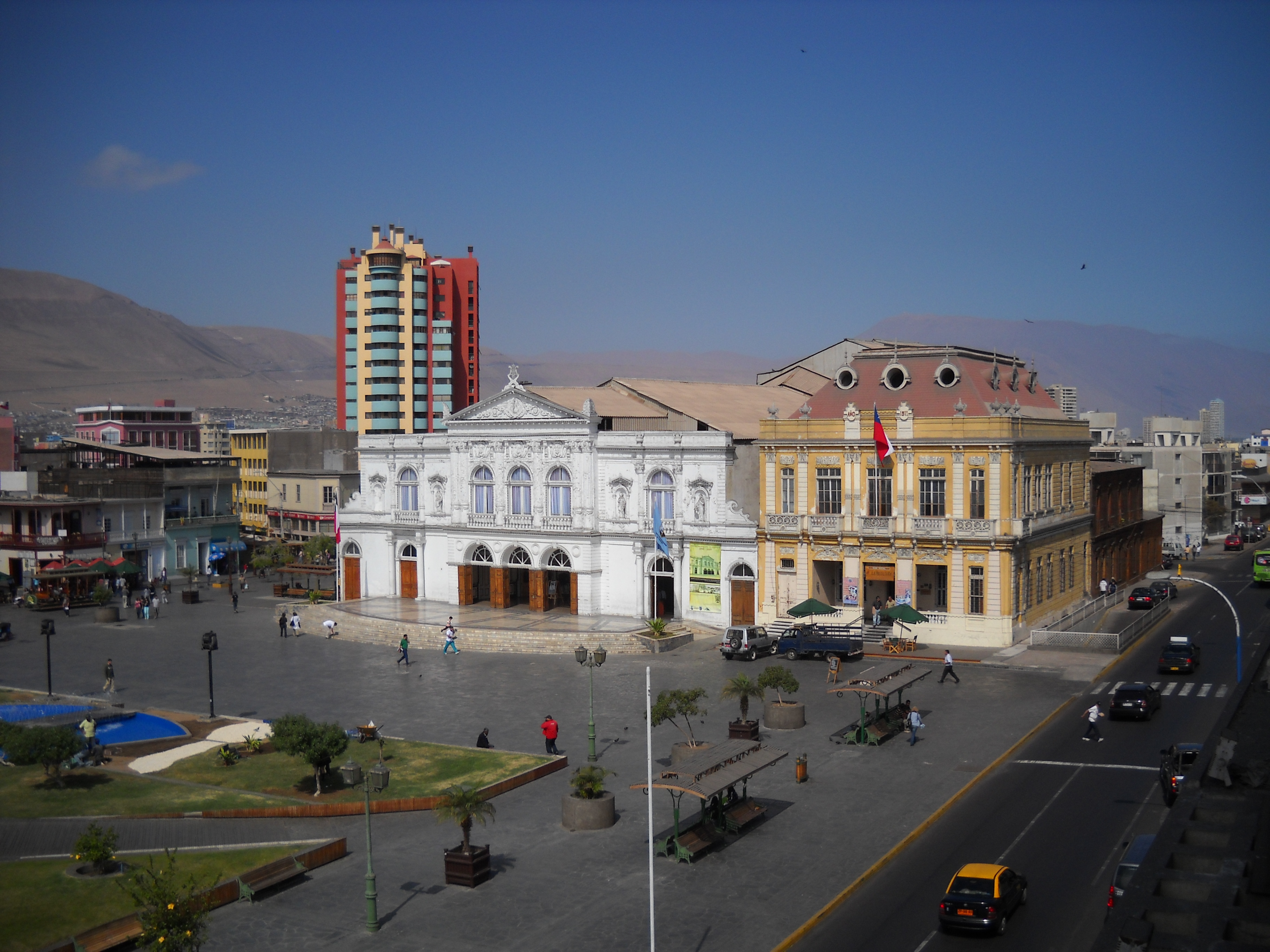 Teatro Municipal de Iquique y Edificio de la Sociedad protectora de los empleados de Tarapacá. Fotografía tomada desde el hotel Prat.